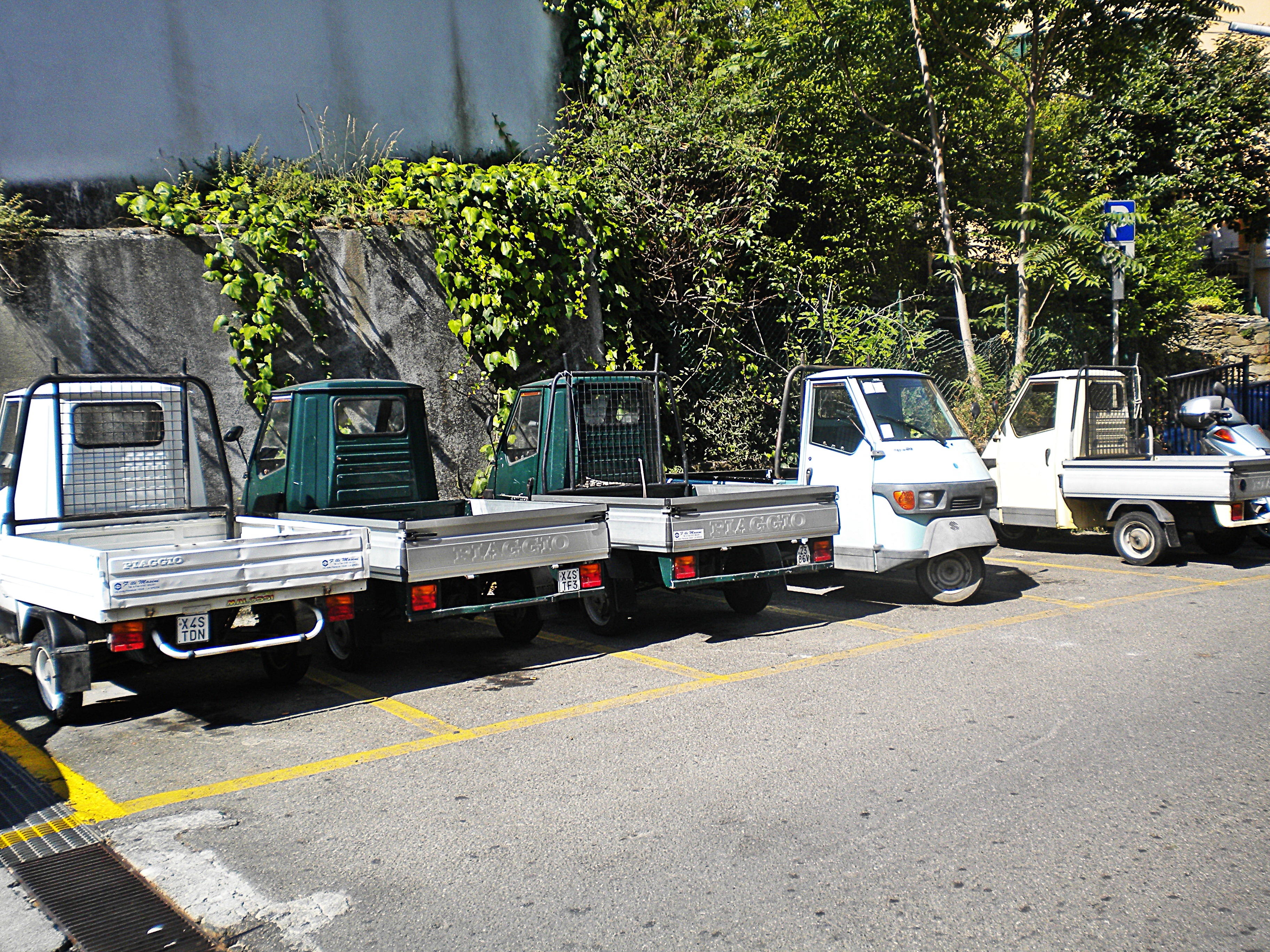 4 ape cars